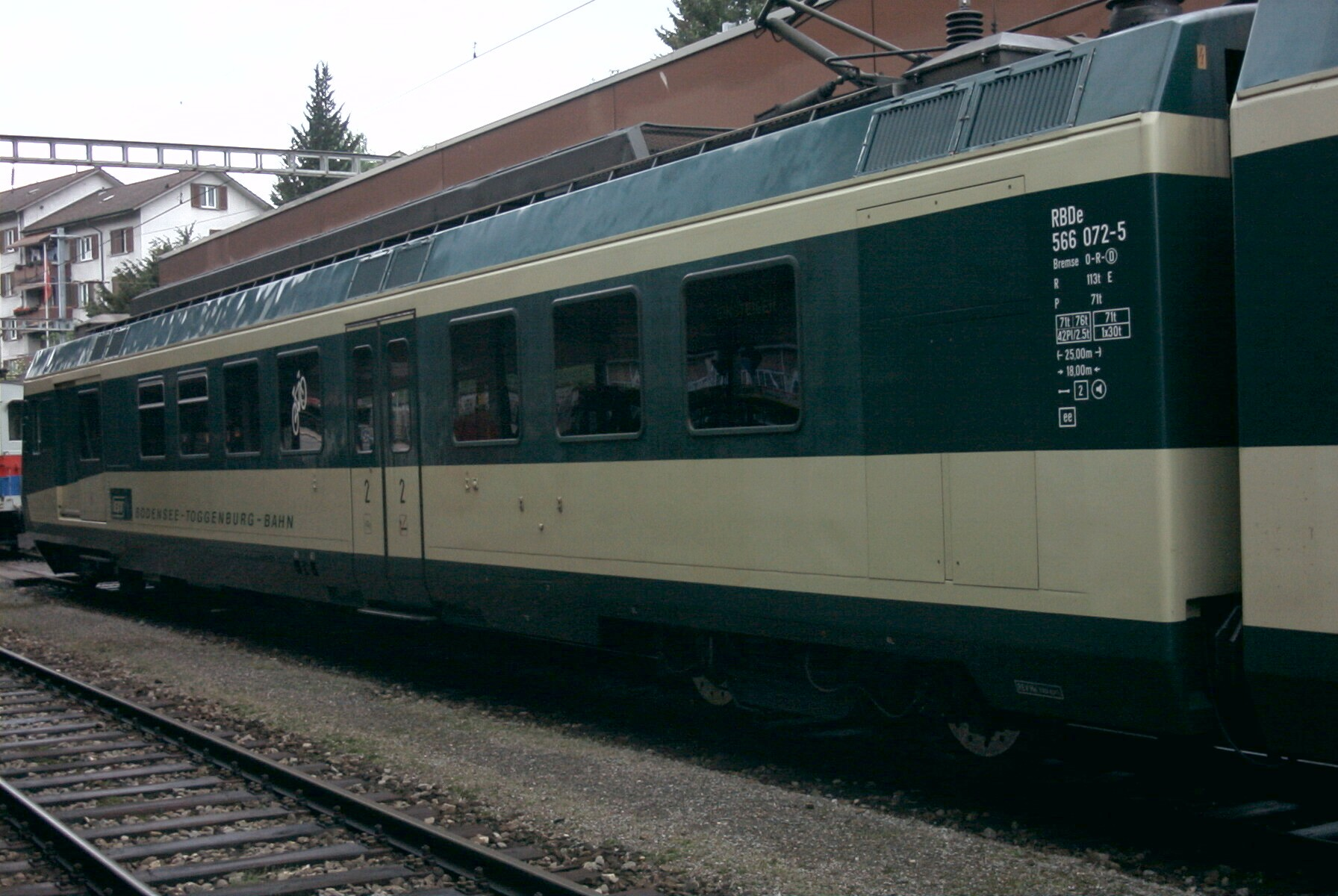 SOB RBDe 566 072 mit letztem BT-Signet (vor Fusion)